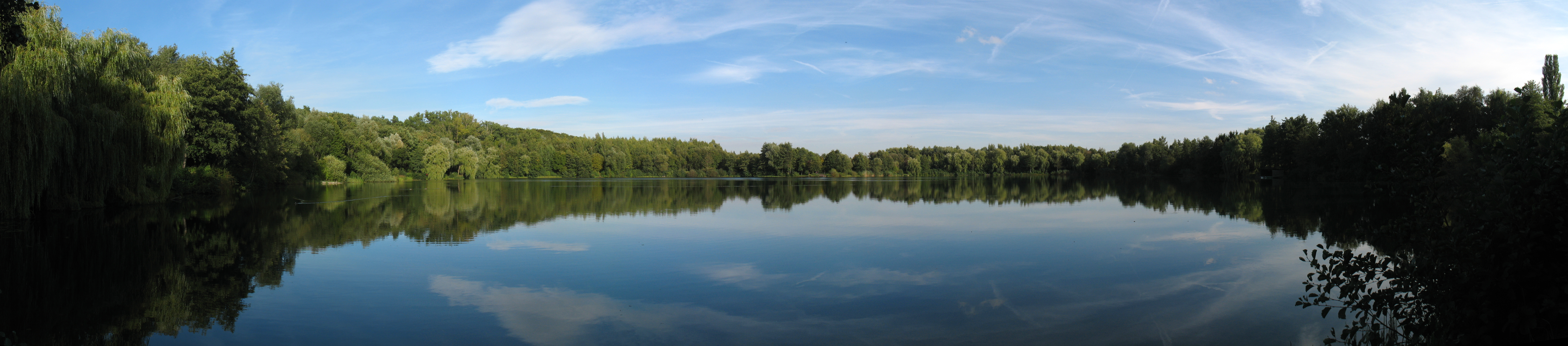 Grube Fernie am Rand vom Bergwerkswald bei Großen Linden.